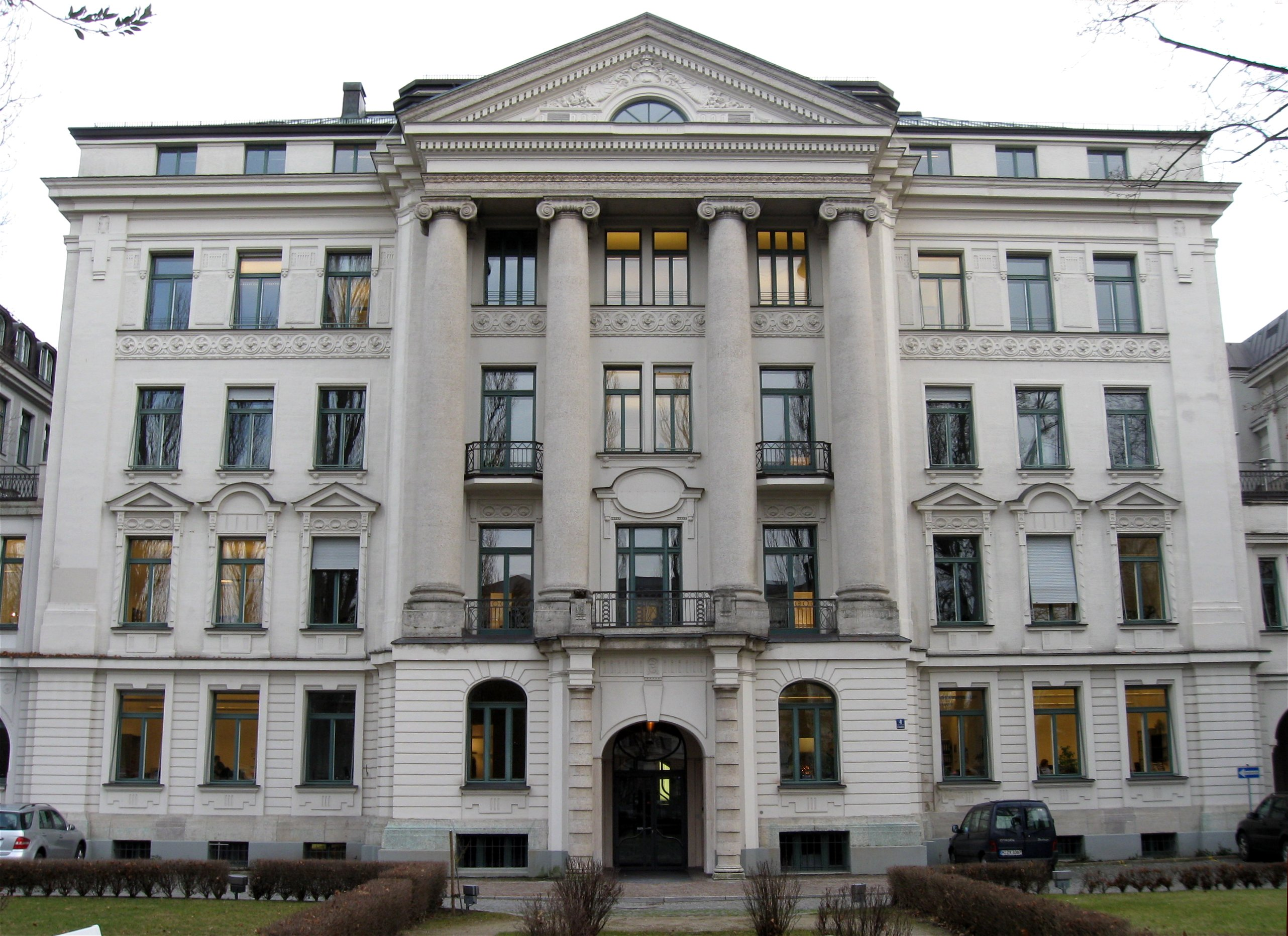 Leopoldstraße 4; Ehem. herrschaftliches Wohnhaus, jetzt Bayerische Rückversicherung, palastartiger Bau im klassizistischen Jugendstil, mit Stuckdekor und mächtigem Portikus, 1896-97 von Martin Dülfer; Mittelteil einer durch niedrige Zwischenbauten verbundenen Häusergruppe, siehe Nr. 6 und Schackstraße 1